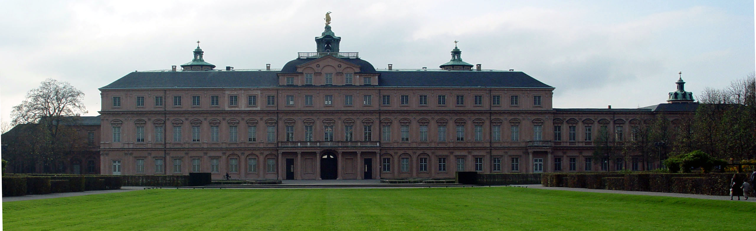 Fotografiert von Martin Dürrschnabel. Schloss Rastatt Parkansicht.